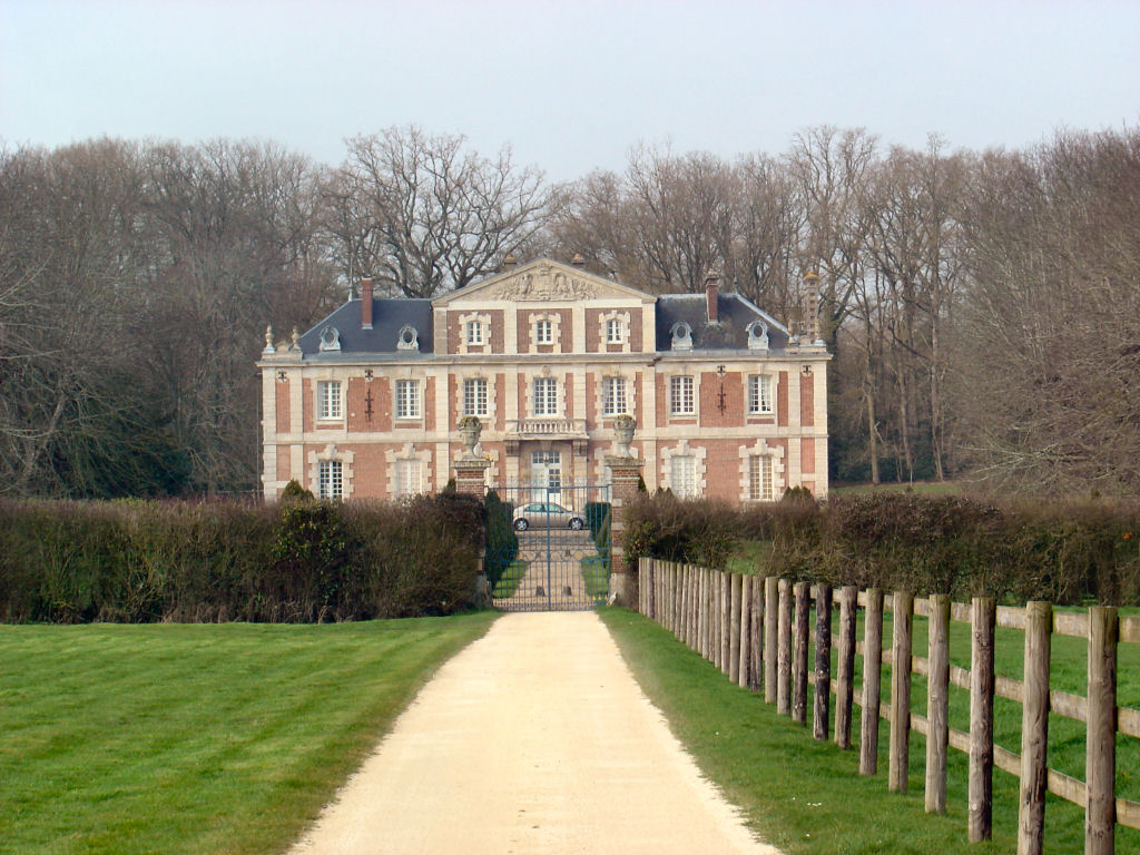 Château du Buisson-Garembourg à Guichainville (27 Eure France -Normandie) - La famille Bence était seigneur du Buisson Garembourg du XVe au XVIIIe siècle.